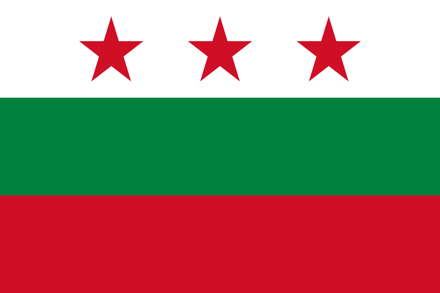 Bandera del Cantón Cevallos